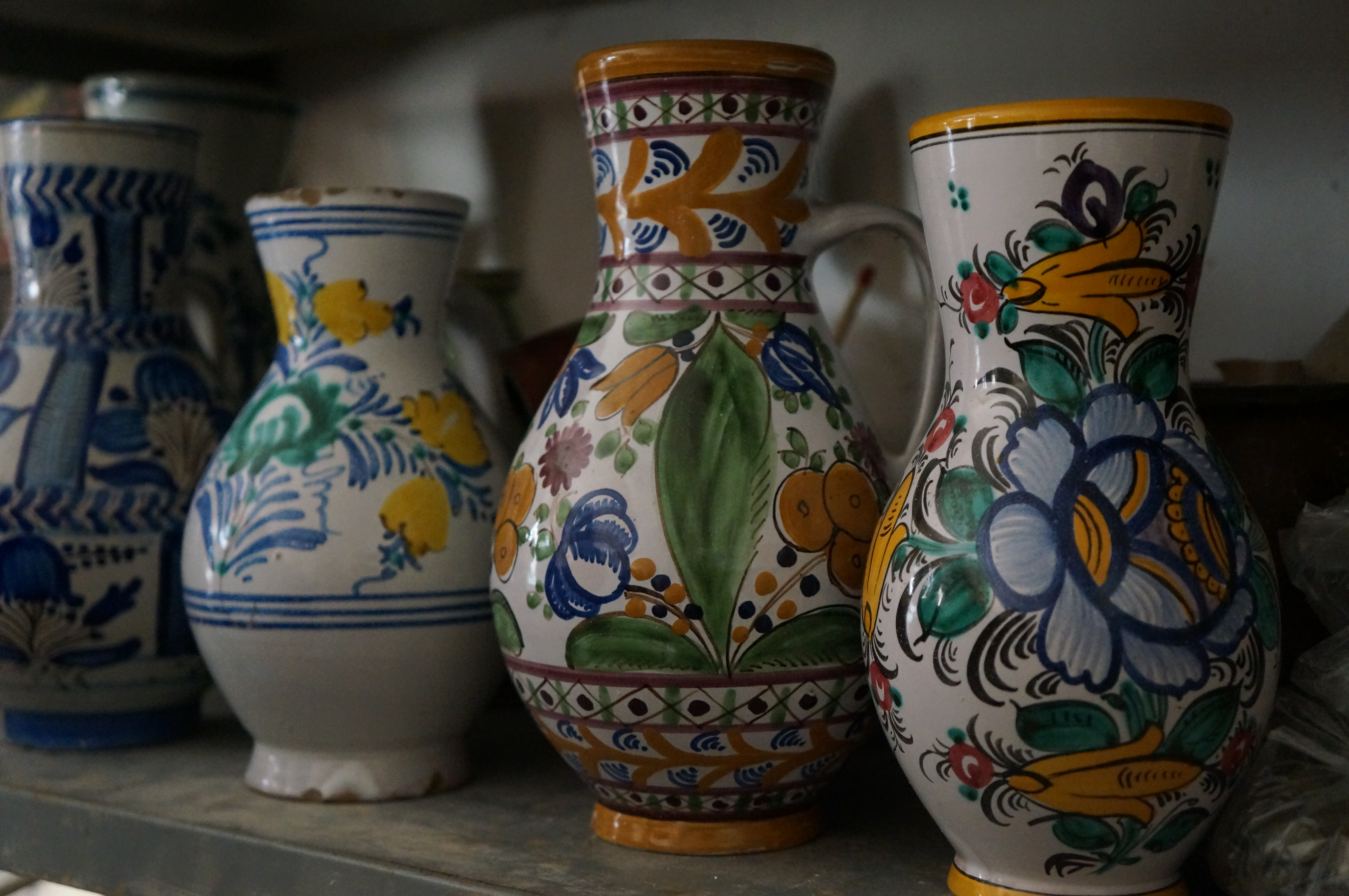 Small pottery factory in Modra, Slovakia